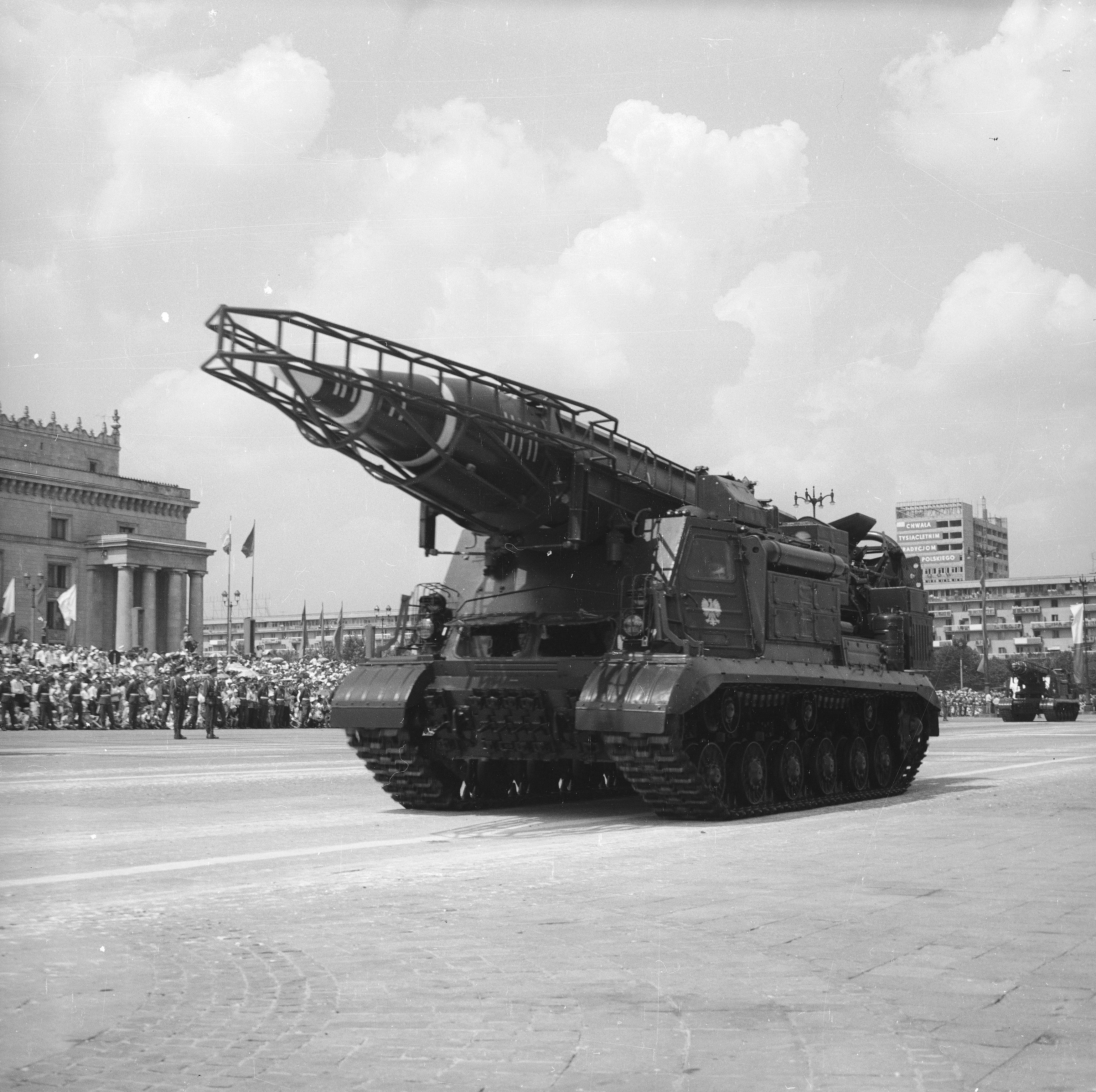 Wyrzutnia rakiet 2P19. Warszawa 1966.